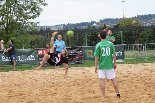 USCD Fallrückzieher 2